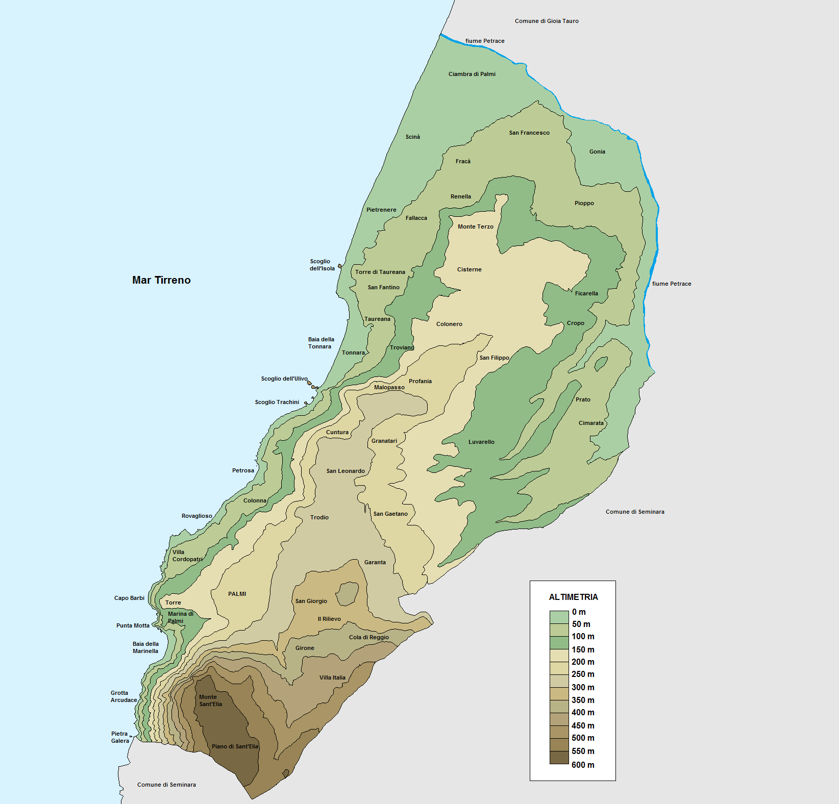 Altimetria del territorio comunale di Palmi